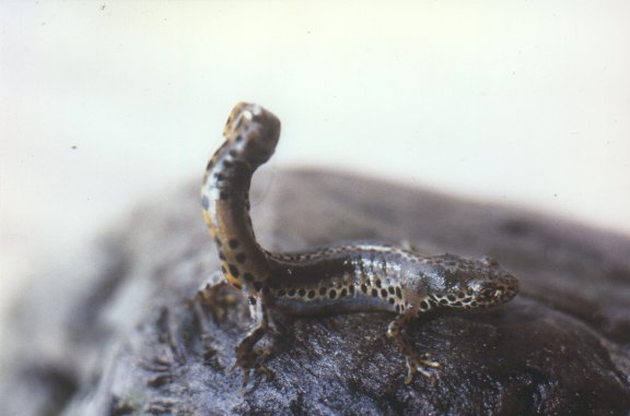 Mesotriton alpestris apuanus